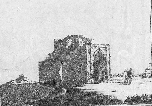 Развалины золотоордынского мавзолея в Маджаре